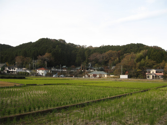 葛山城址を全景で撮った写真。前方の山一体が葛山城